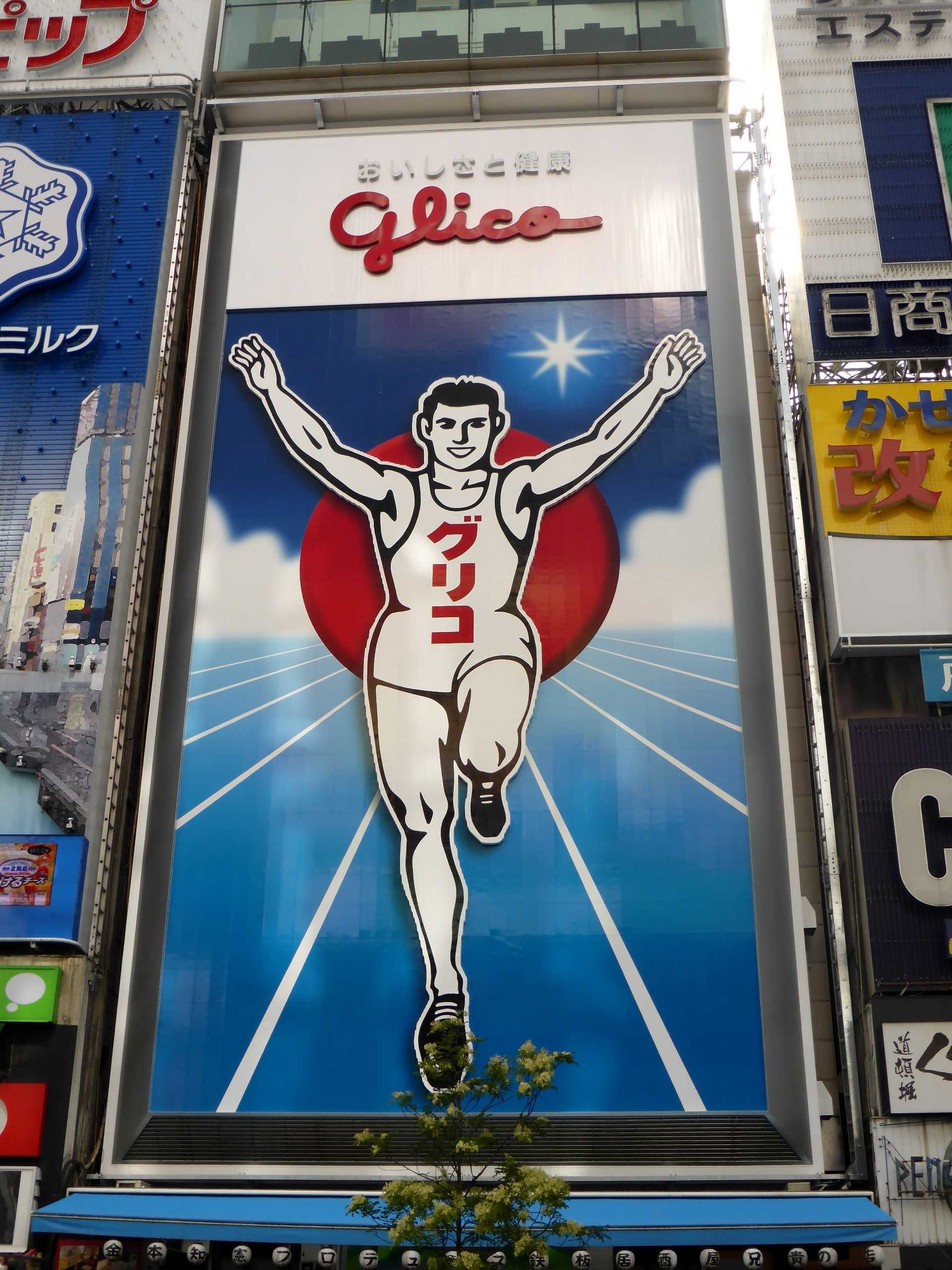 2014年11月3日時点の道頓堀のグリコサインを撮影。